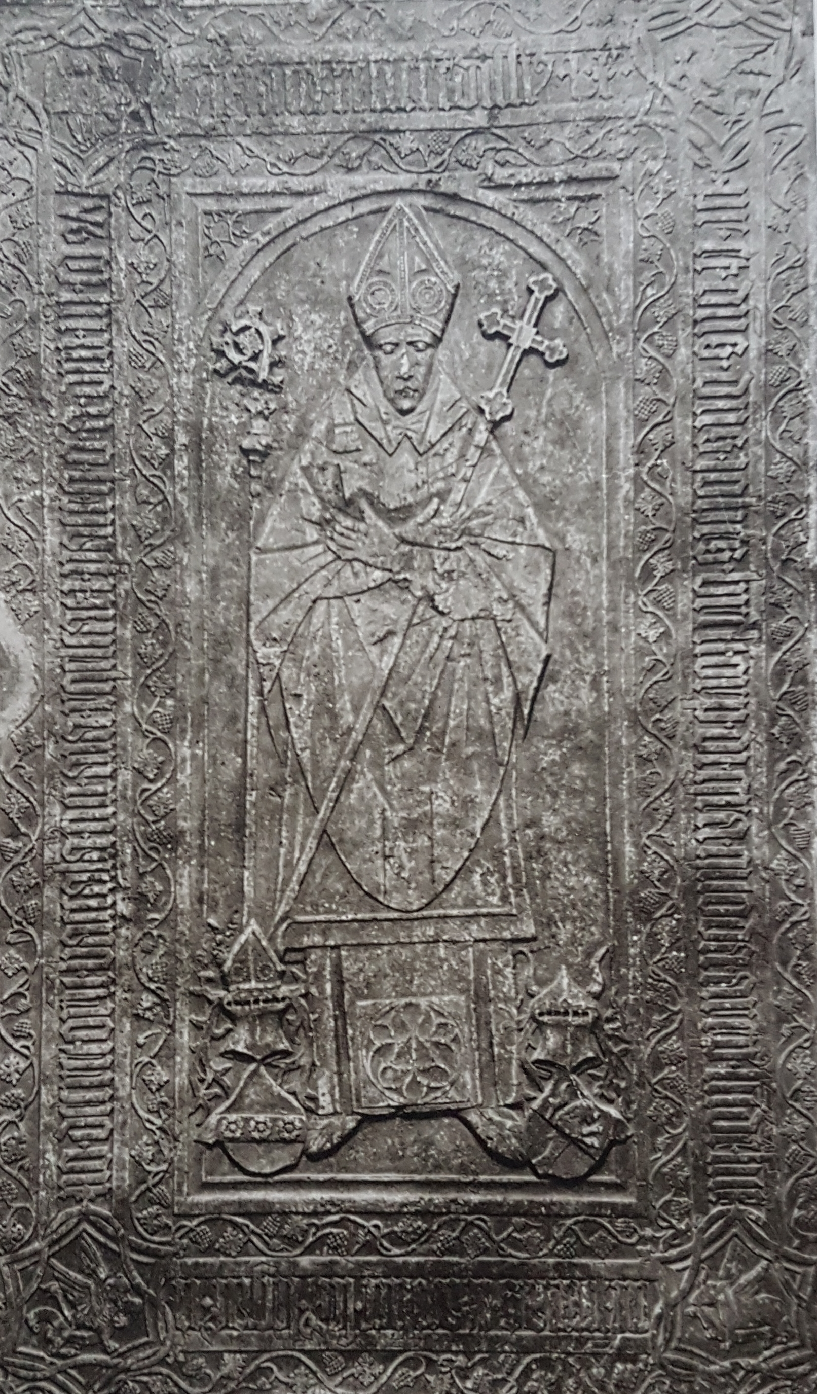 Ärkebiskop Brostrups gravsten itförd av Brostrupsmästaren avfotograferad bild från Allhems Svenskt konstnärslexikon.